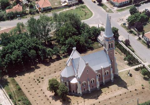 Jászszentandrás, Hungary, aerialphotography. Szent Kereszt Felmagasztalása római katolikus templom